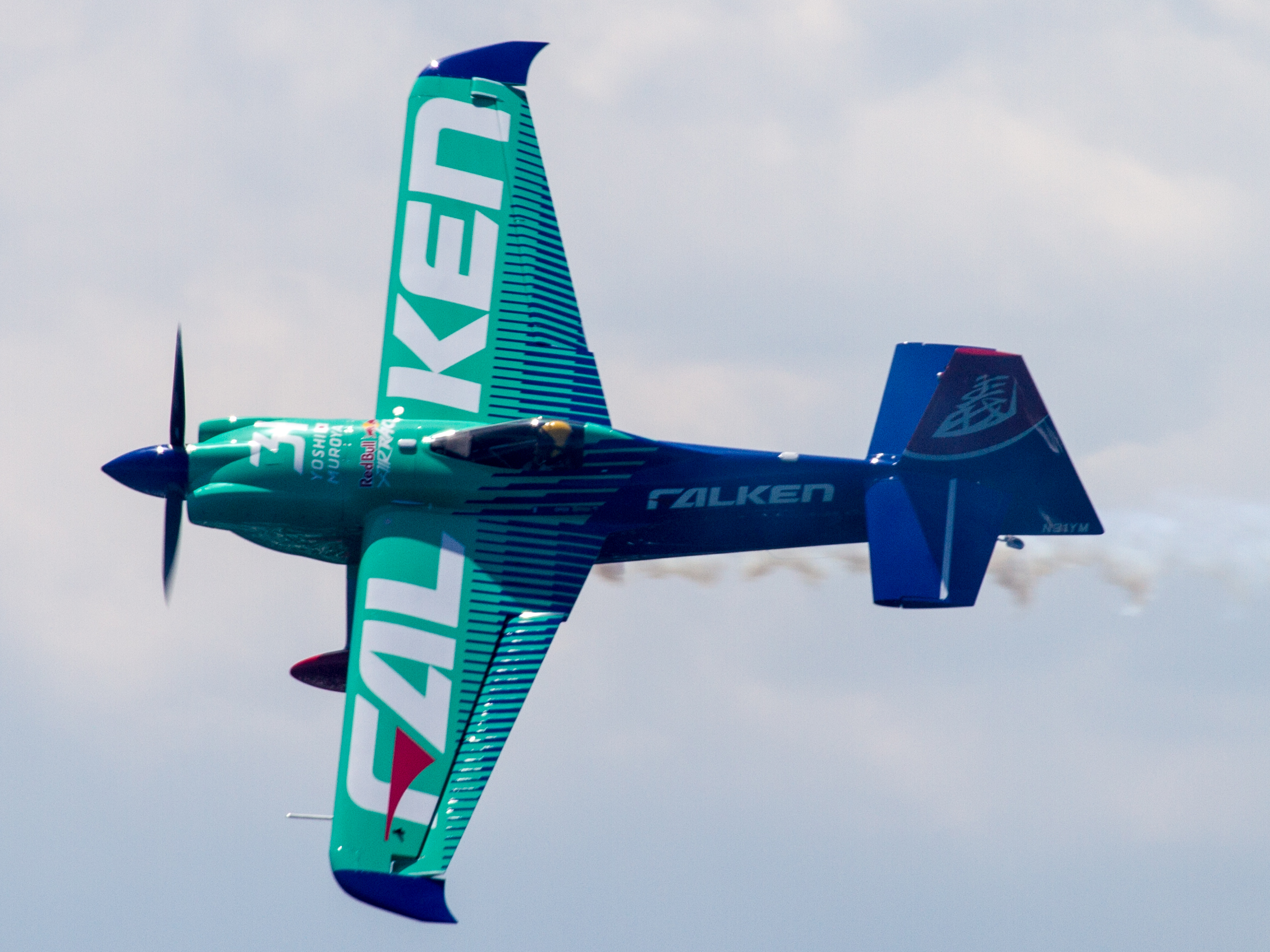 2017年レッドブル・エアレース・ワールドシリーズ 千葉 優勝した室屋義秀の機体